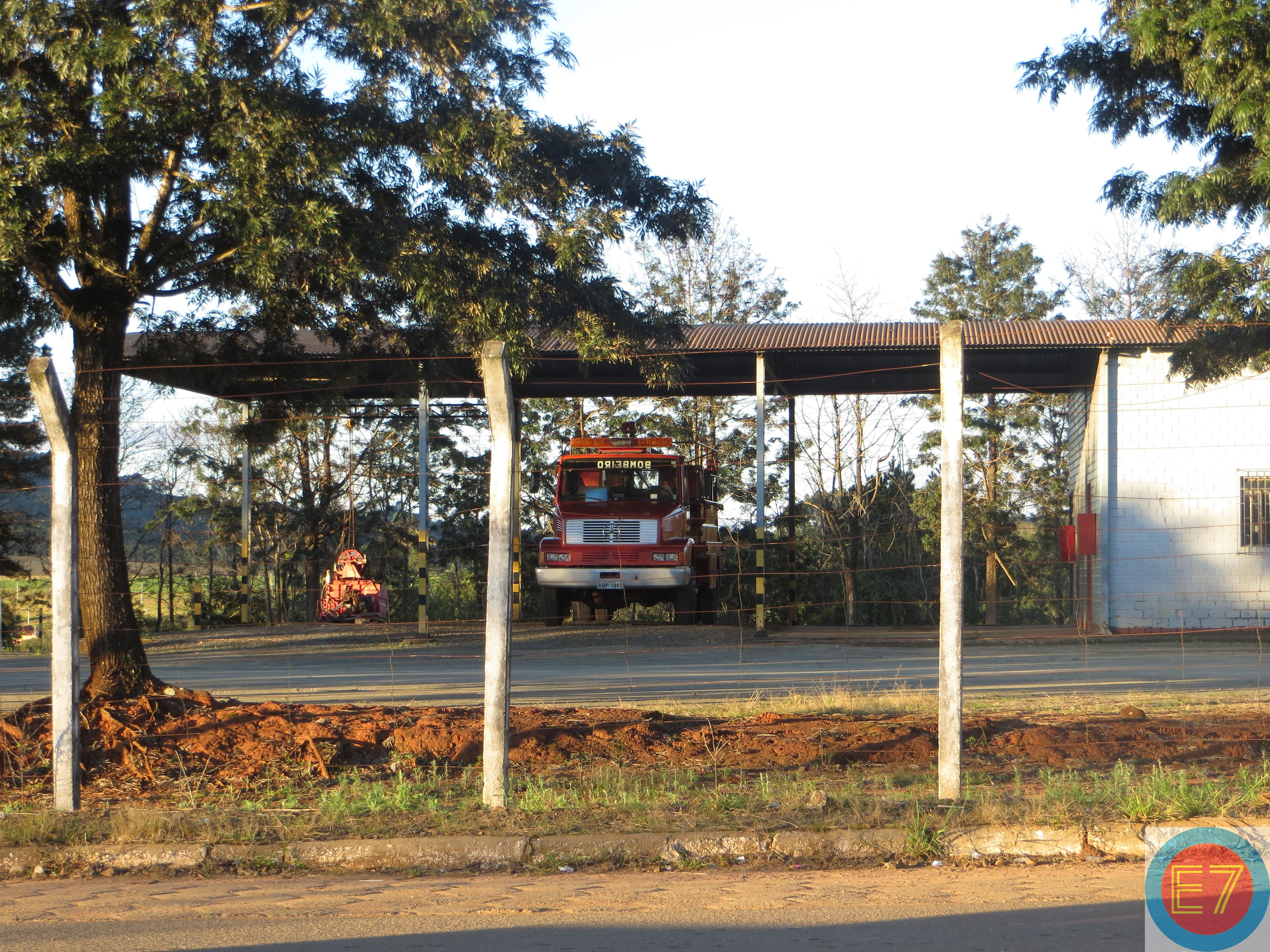 Sede do Corpo de Bombeiros em Curiúva, Estado do Paraná, Brasil.